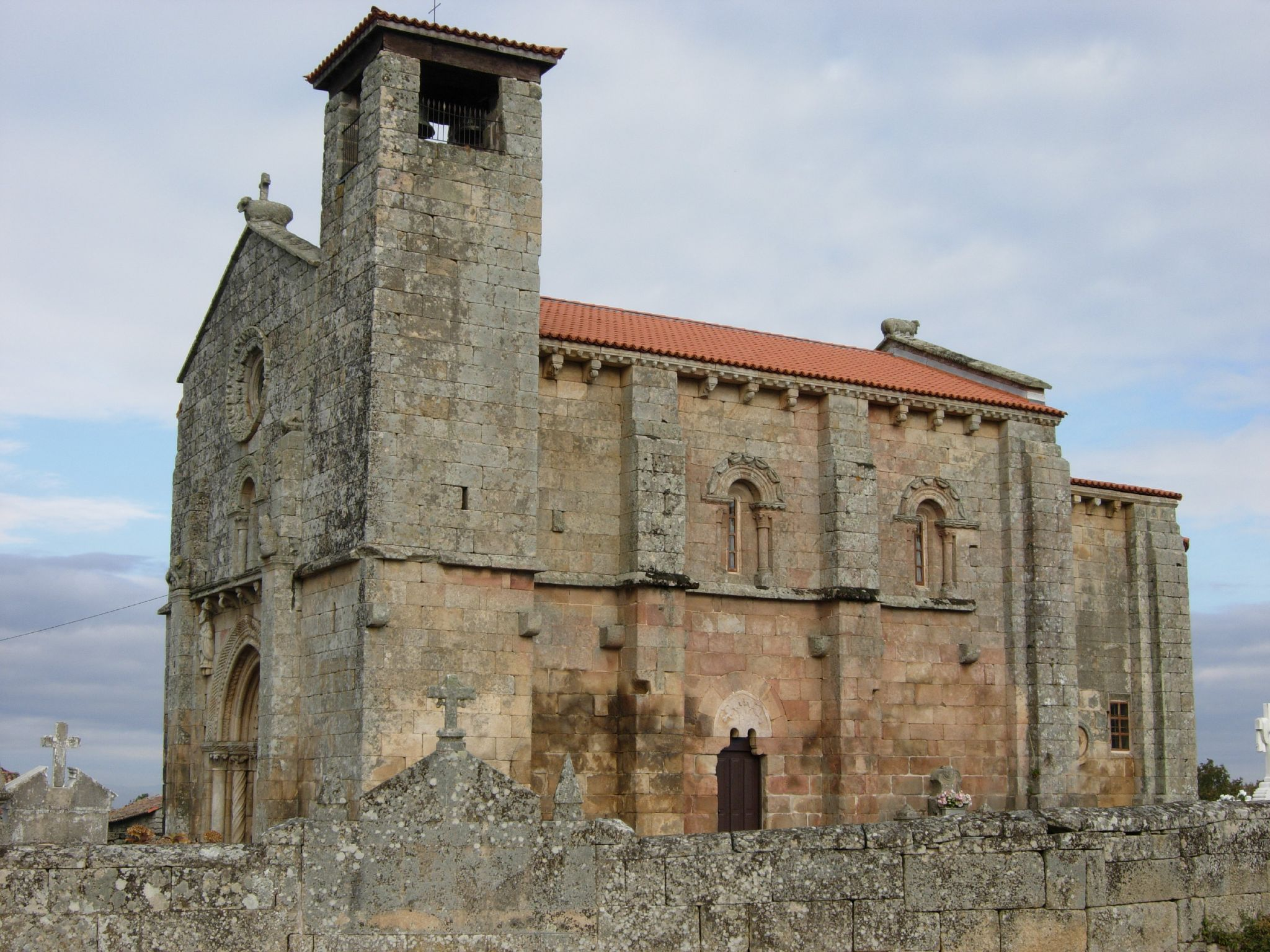 Igrexa de San Pedro da Mezquita - A Merca - Ourense